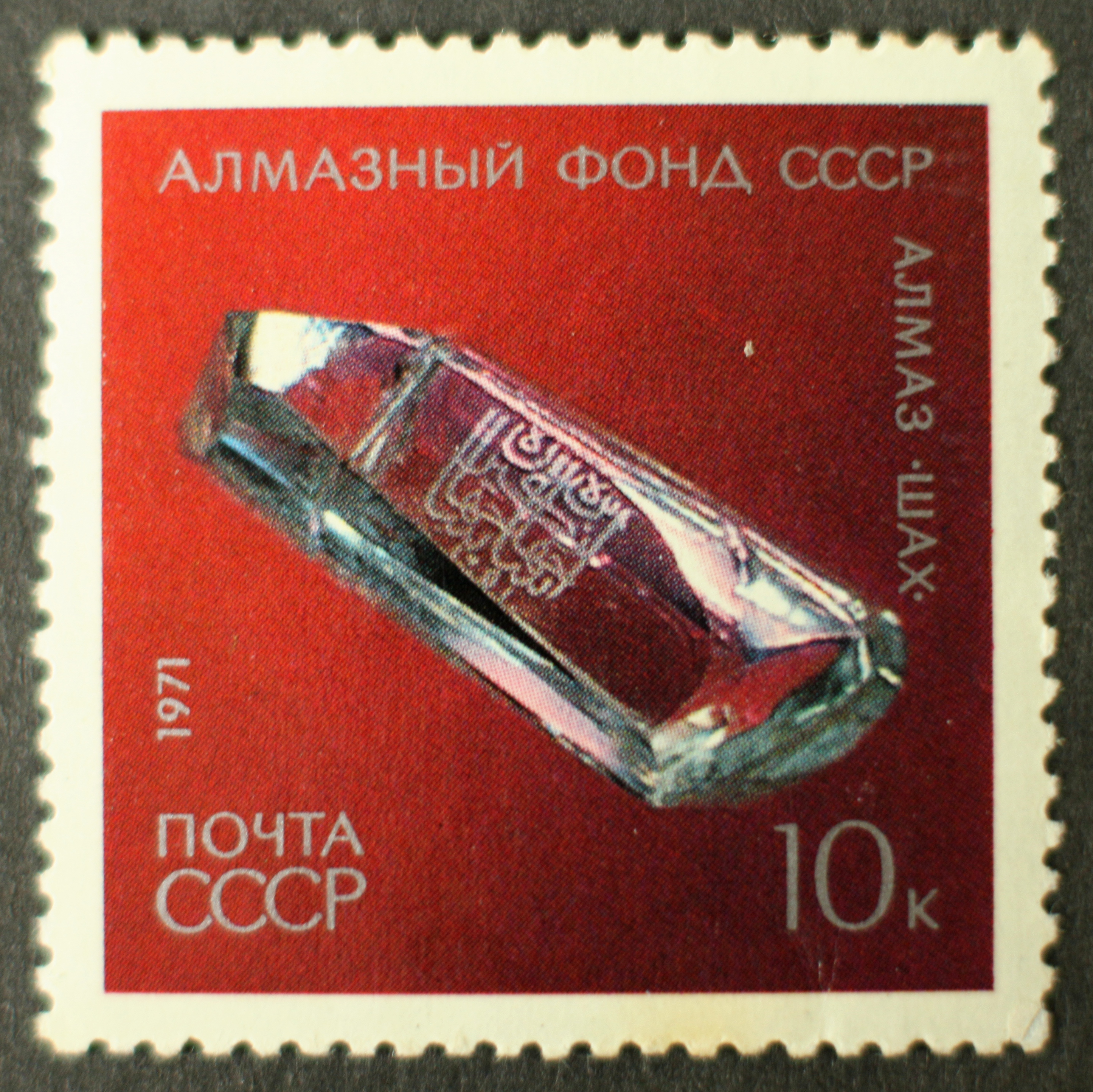 Briefmarke, Sowjetunion